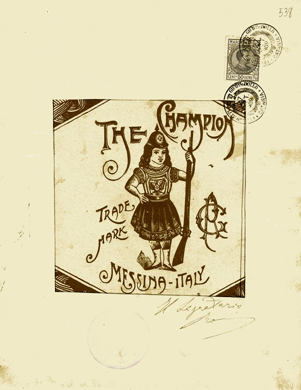 Marchio di fabbrica The Champion della ditta Giovanni Rizzo fu Angelo di Messina, raffigurante una bambina con elmo alla prussiana e corazza (AS Catania, Prefettura di Catania, I, el. 42, b. 33/508 , fasc. 4, c. 538r., 1909)